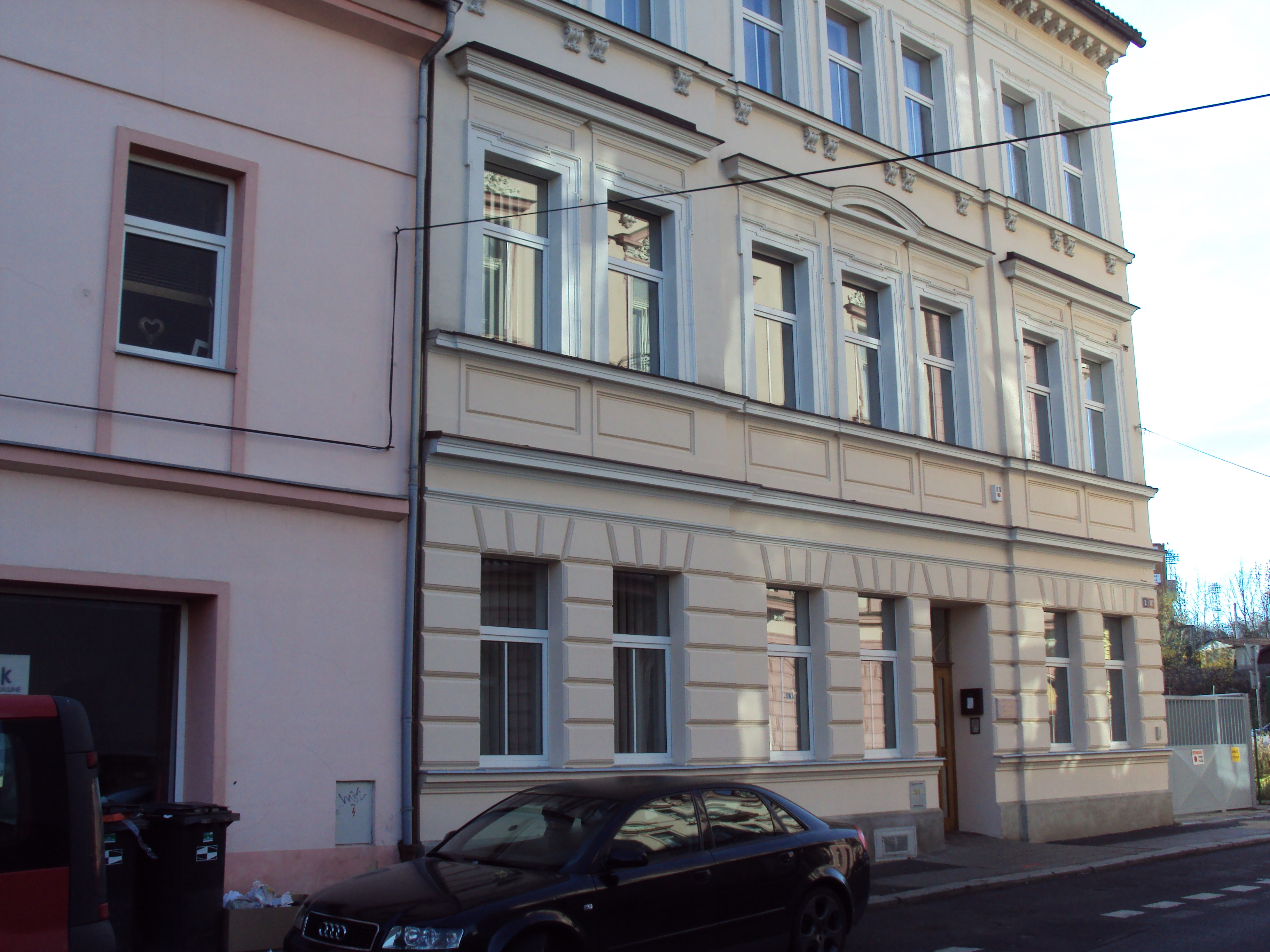 Sál Království svědků Jehovových v Teplicích v Brožíkově ulici 897